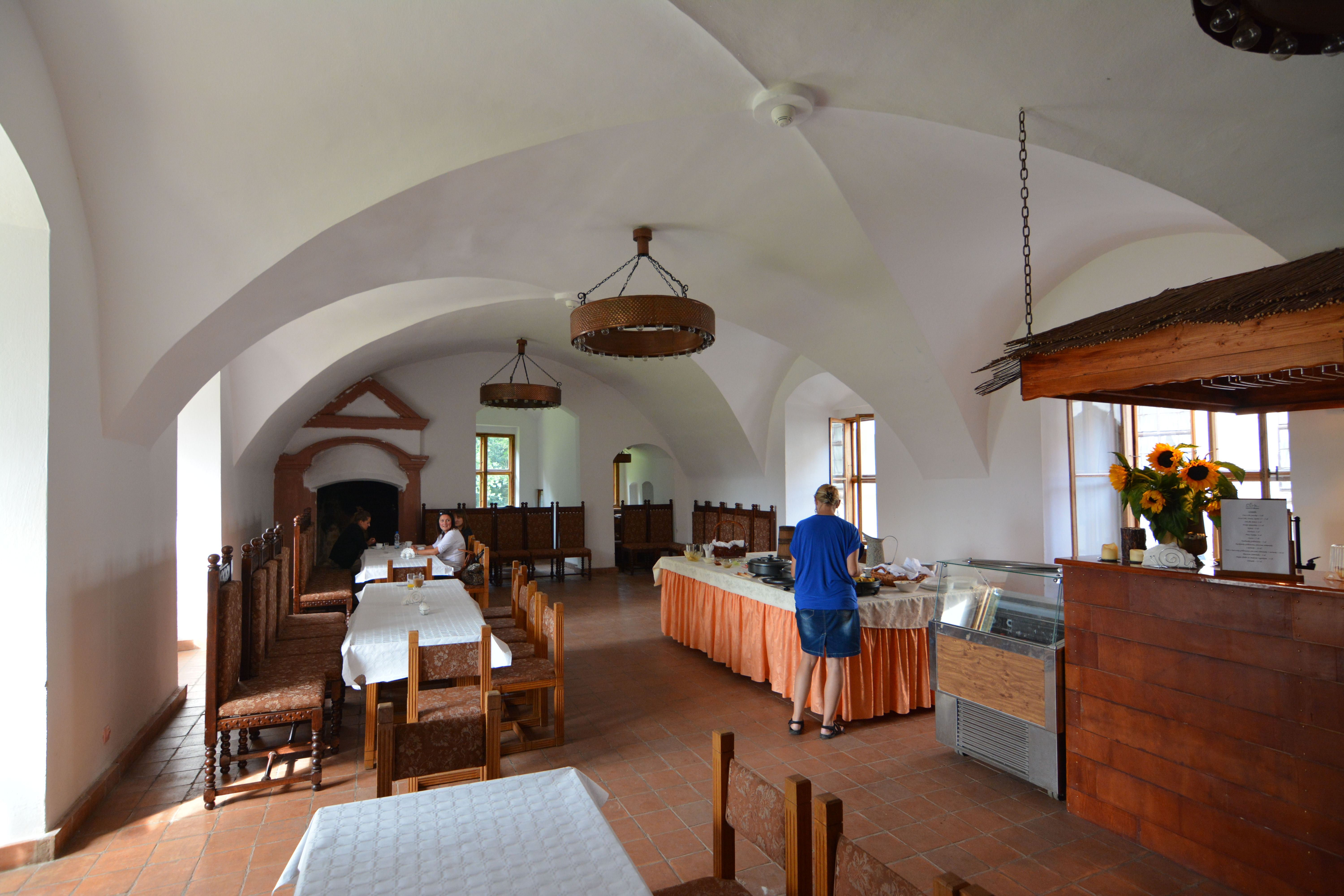 Pęzino - zamek, XIV, 1 poł. XVI, 1600, XIX